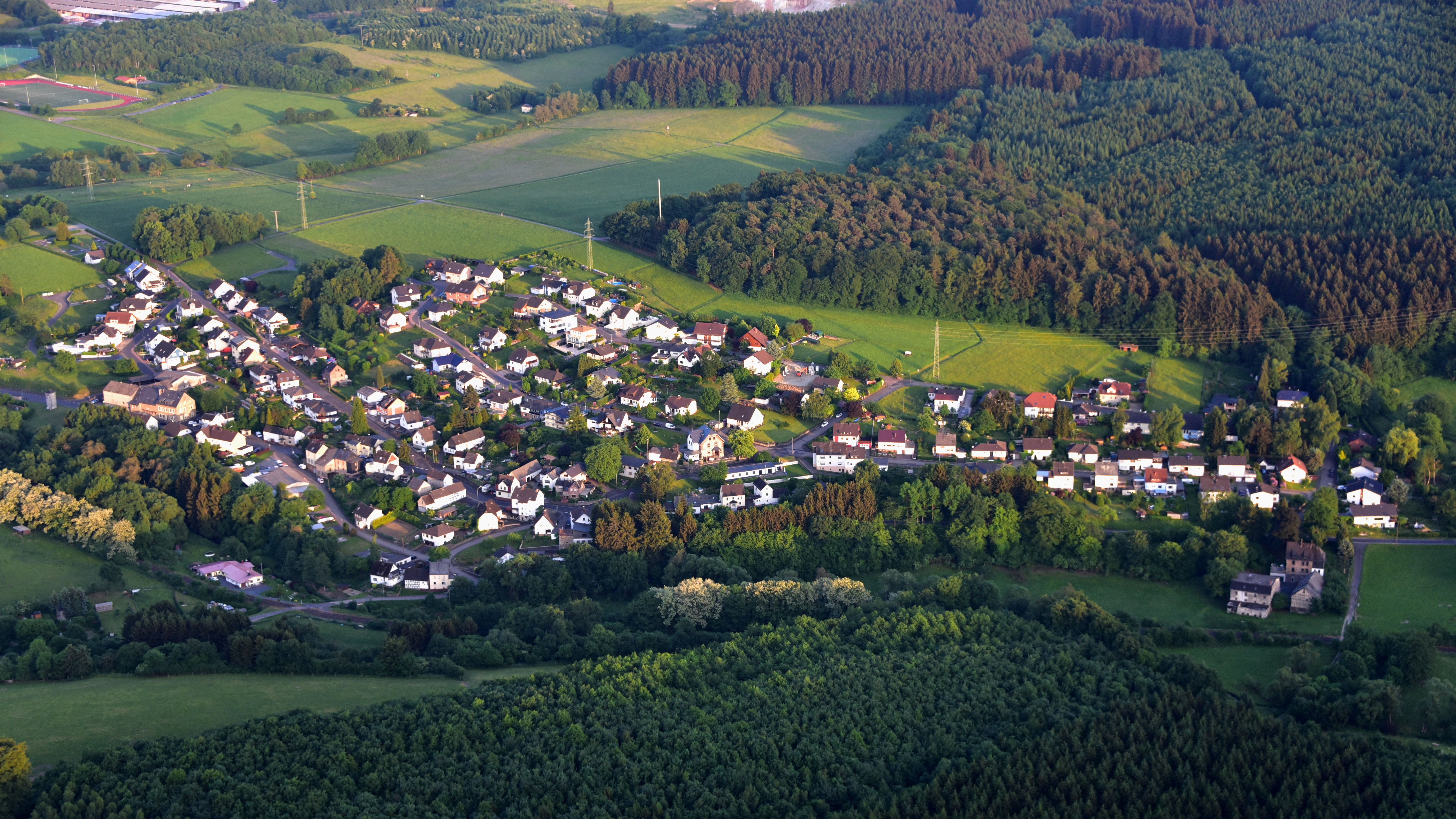 Hundsdorf (Westerwald), Luftaufnahme (2018); 110-kV-Freileitung (Bl. 0140) am südlichen Siedlungsrand